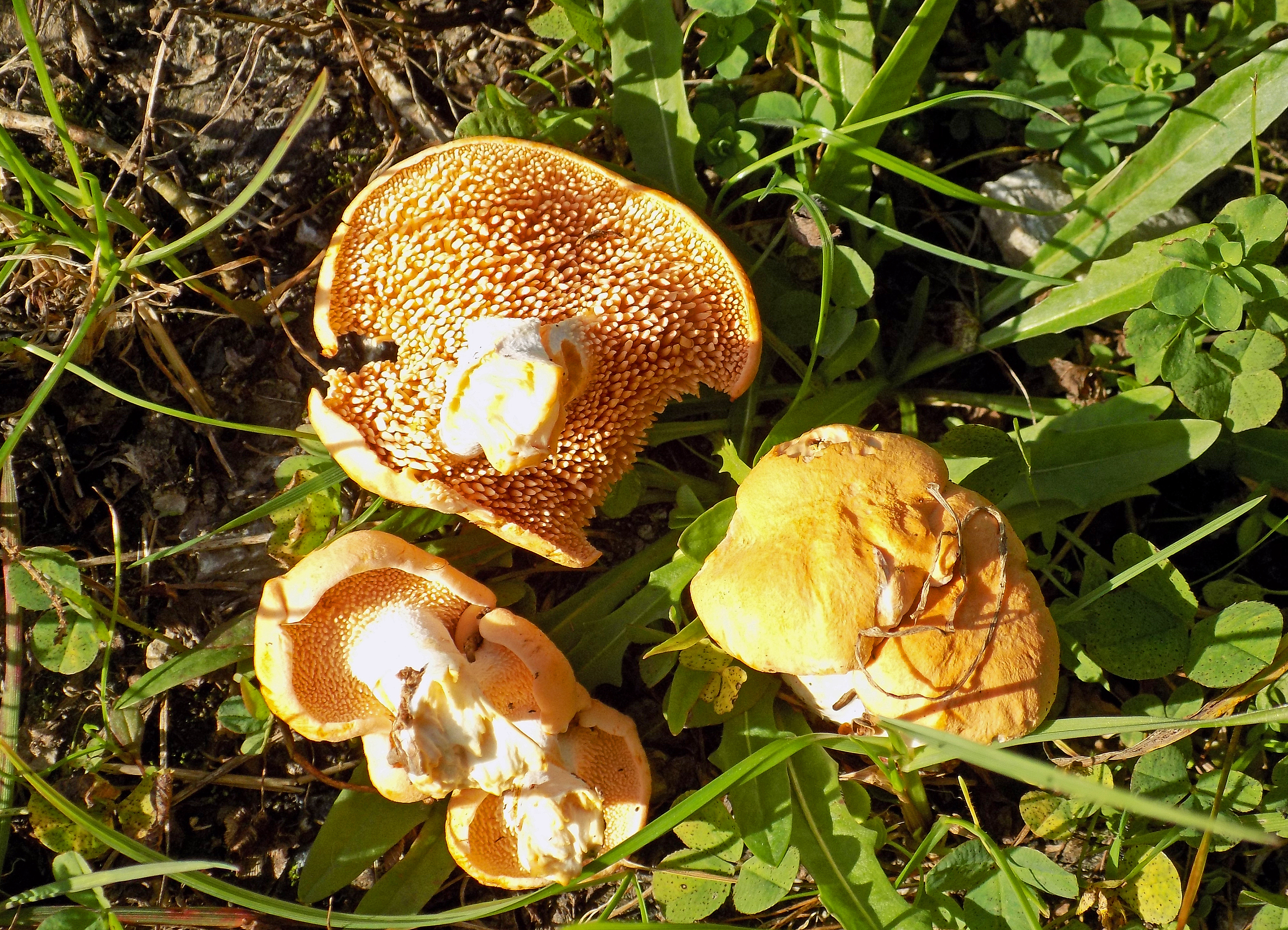 Hydnum rufescens (pied-de-mouton) photographié en forêt de Longeville-lès-Saint-Avold, septembre 2014.